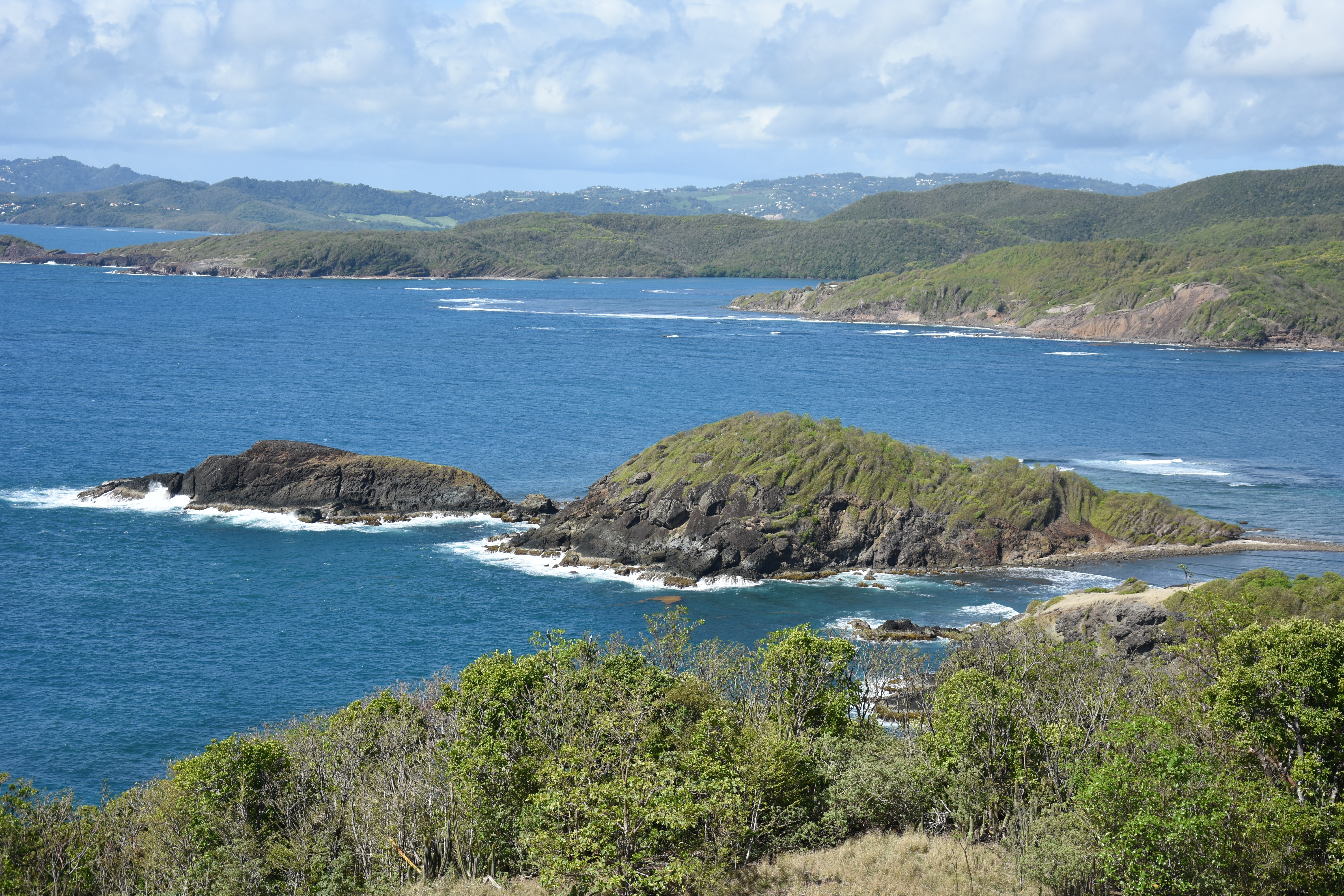 Site historique, belle randonnée pédestre, Pointe de la Caravelle, Trinité Martinique